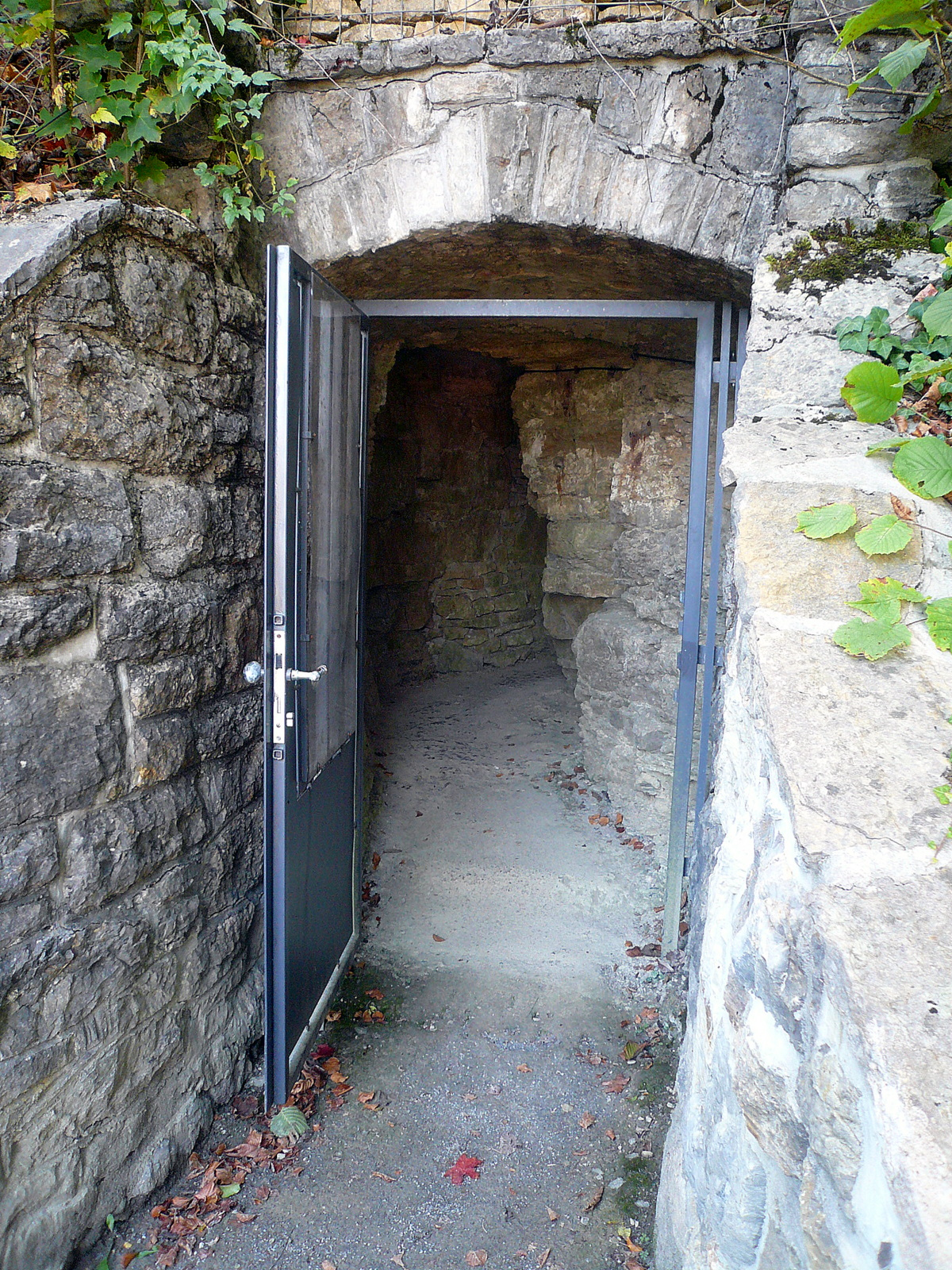 Goetz-Höhle